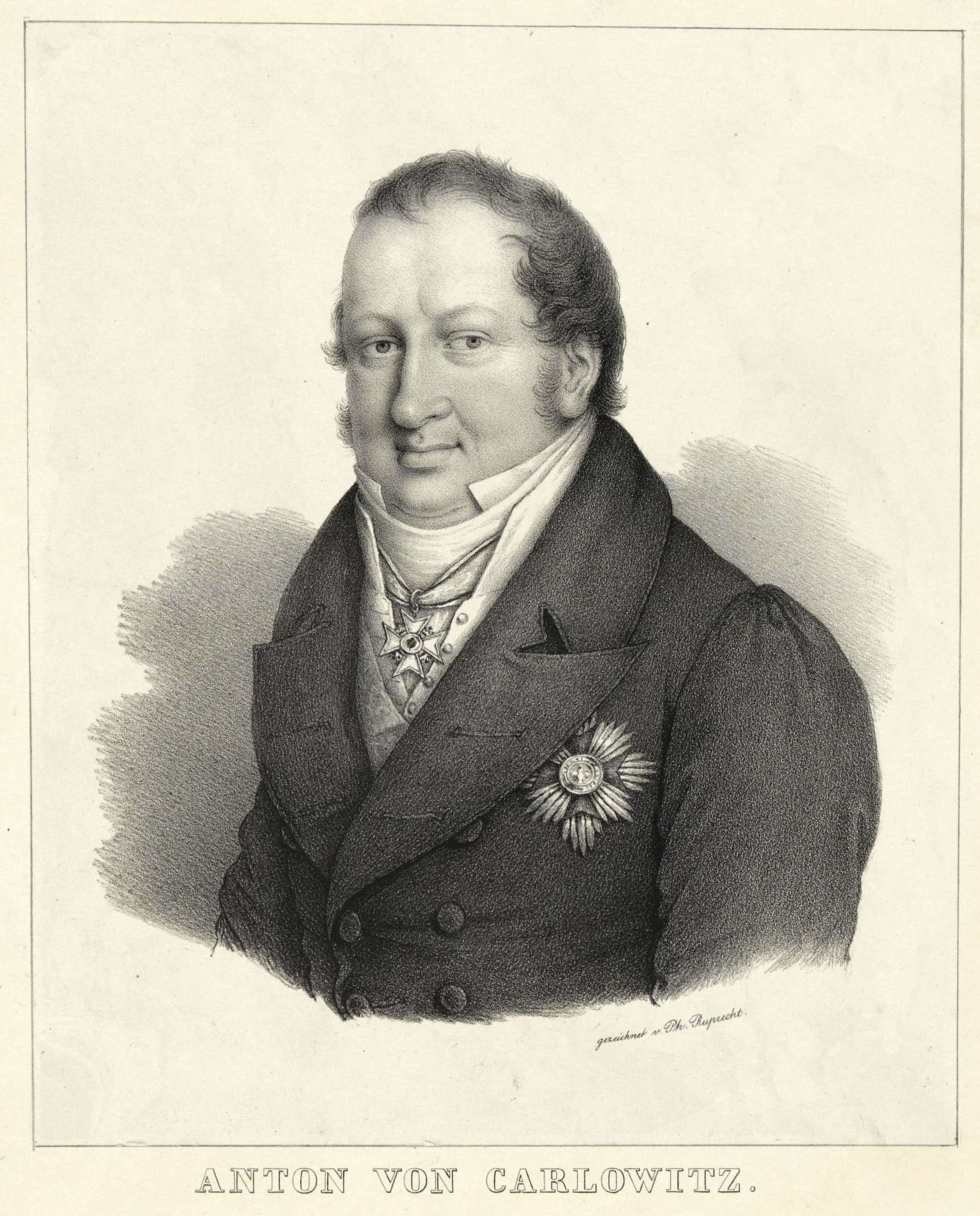 Bildnis des Anton von Carlowitz (1785-1840); Lithographie, um 1826/1850 Coburg, Kunstsammlungen der Veste Coburg, Inventar-Nr. VI,478,1, Mappe 6, Passepartout 20